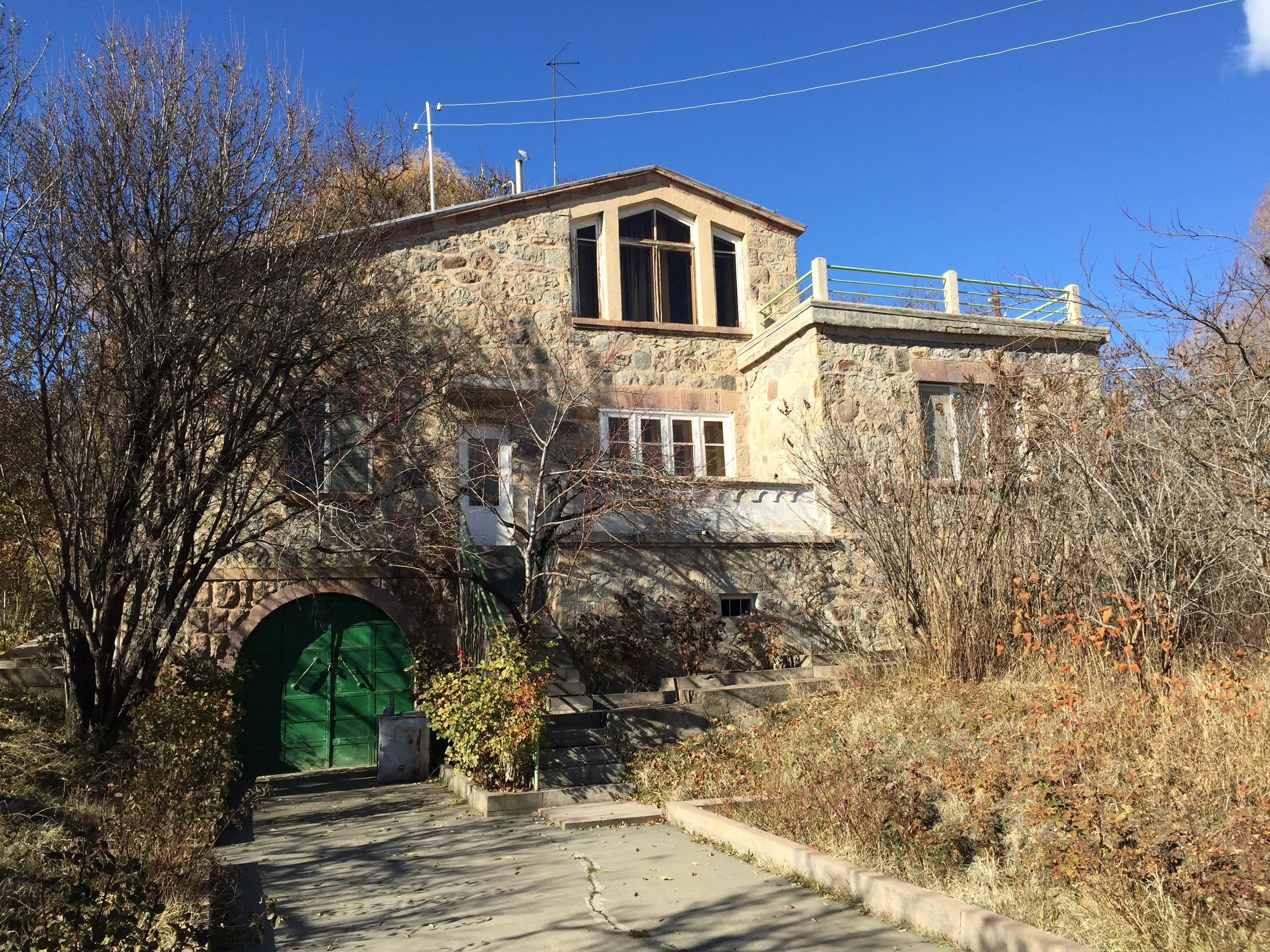 Սևակի տունը հայրենի զանգակատուն գյուղում